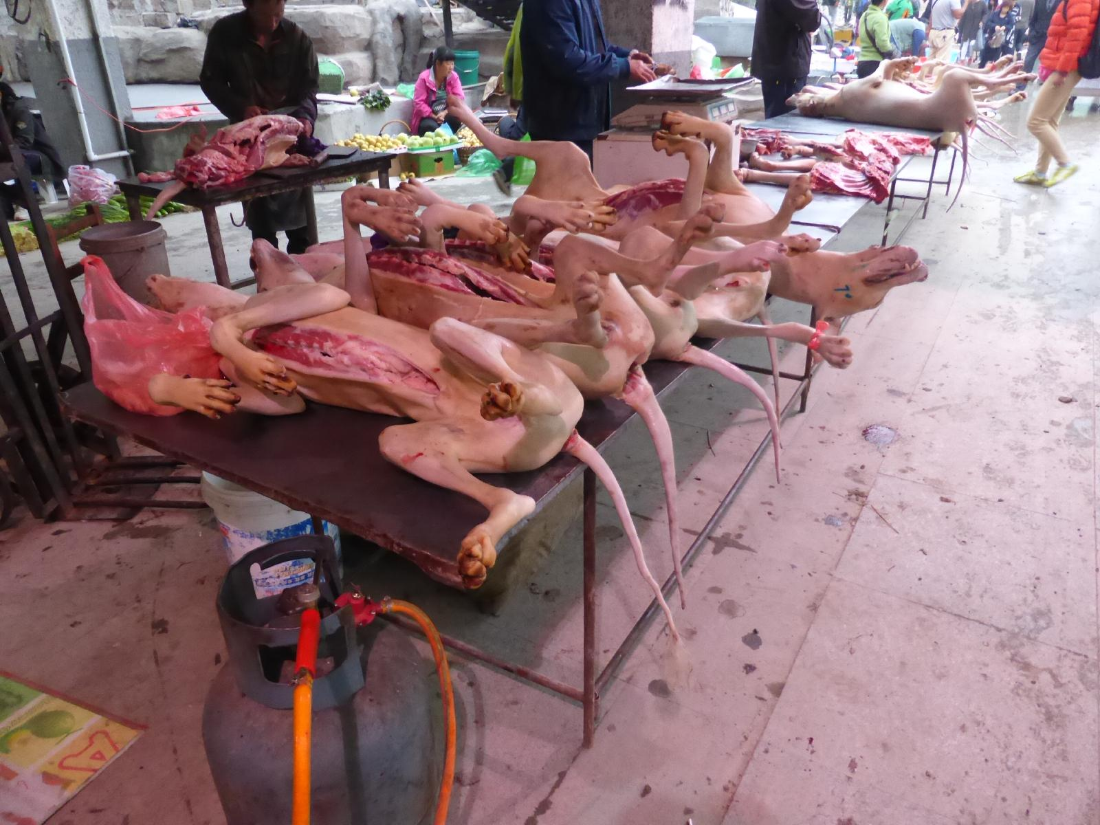 延吉市の朝市にて